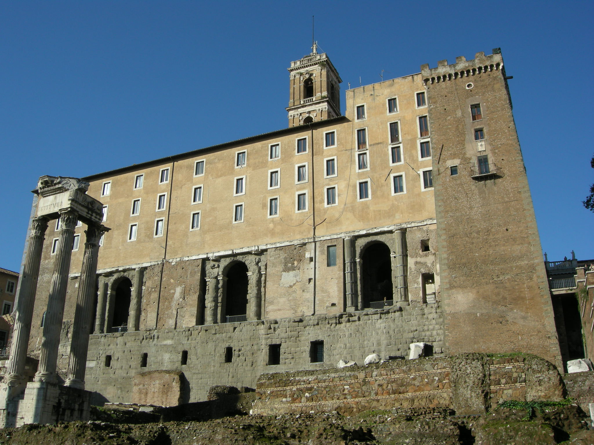 Tabularium